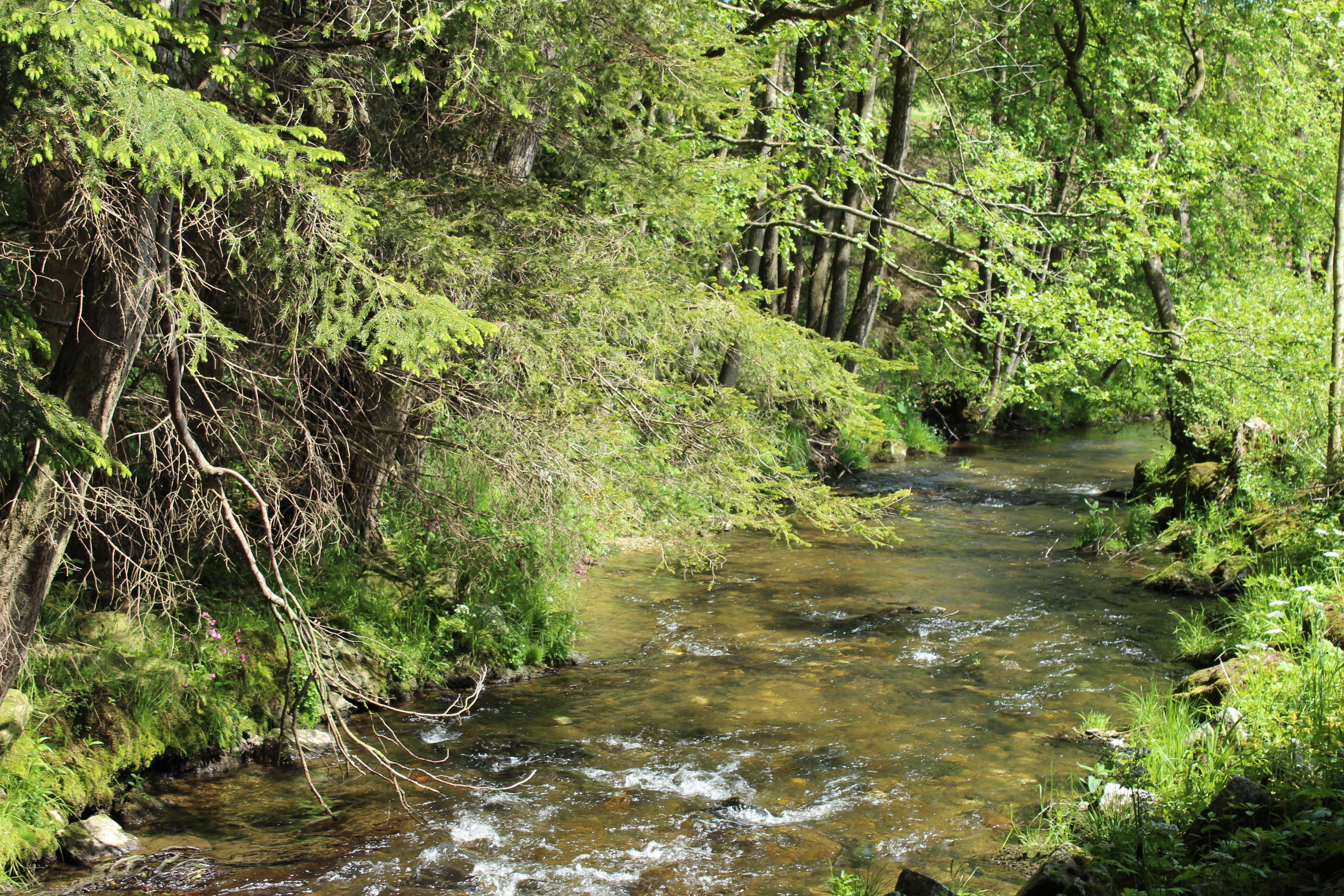 Die Ruhmannsfeldner Leite ist ein Landschaftsschutzgebiet zwischen Gotteszell und Ruhmannsfelden im Landkreis Regen (Teisnachschlucht). LSG-Nr. 00156.01